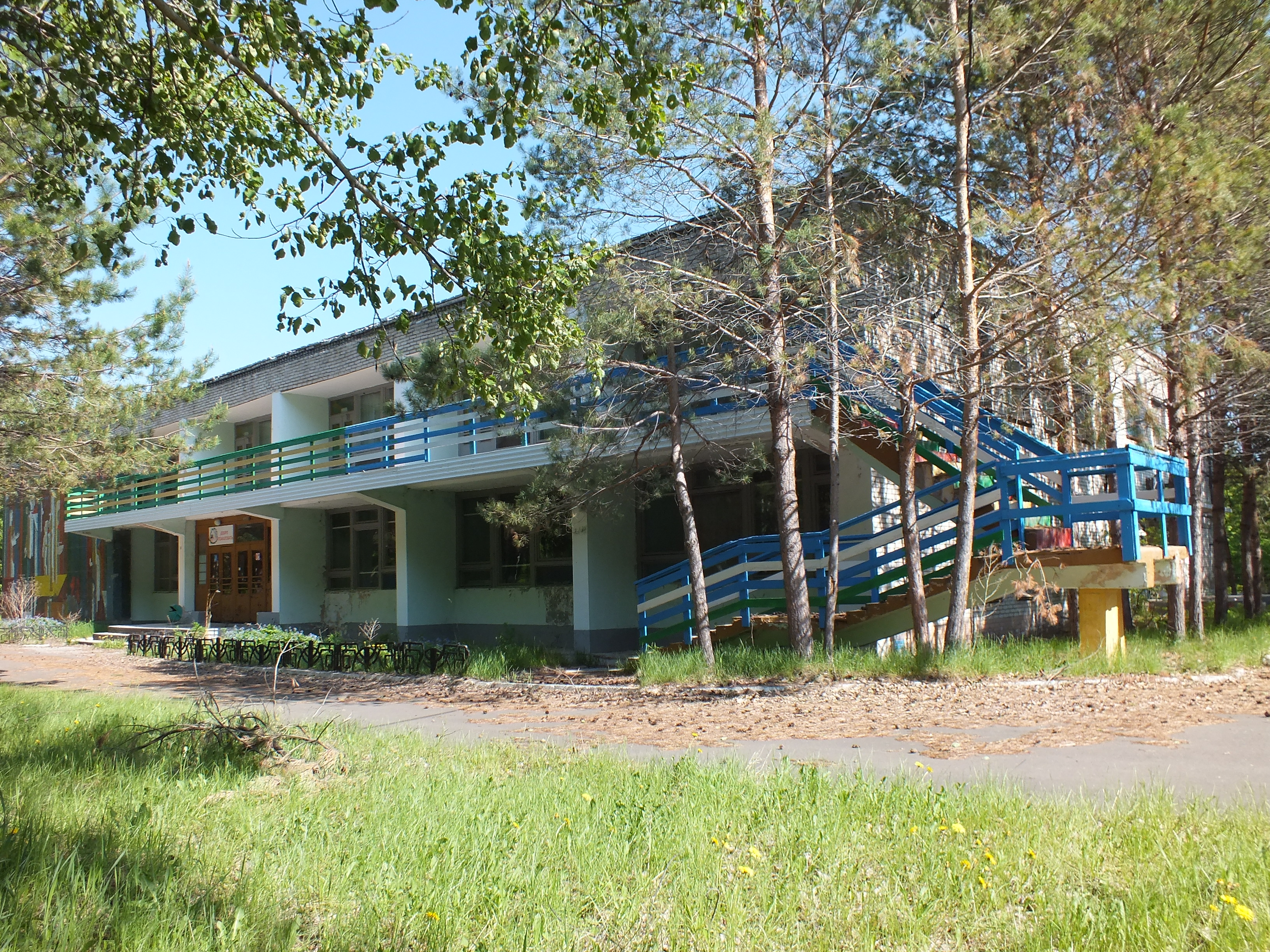 Омми, бывший пионерский лагерь "Амурская жемчужина"